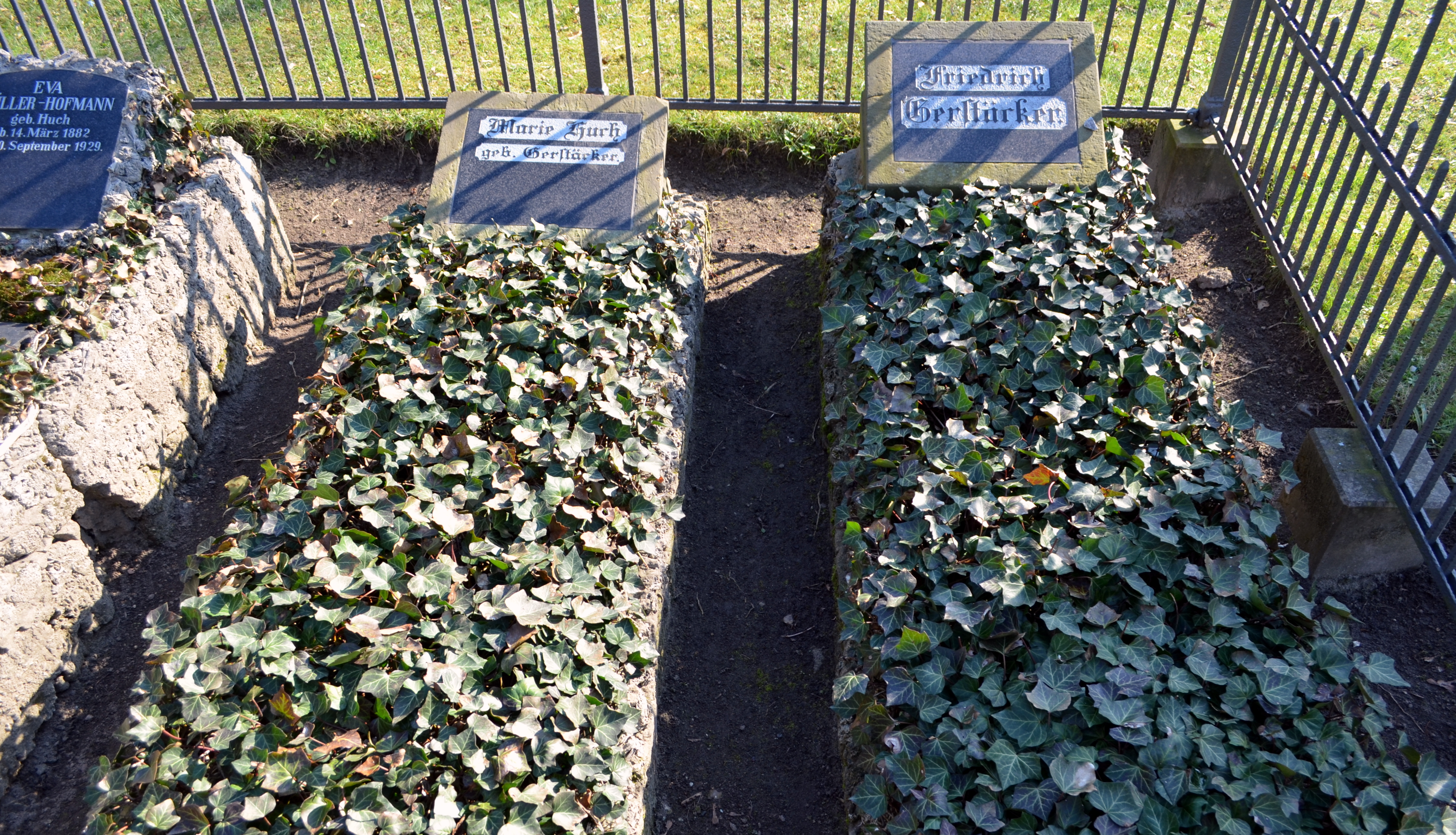 Gräber von Friedrich Gerstäcker (rechts) und dessen Tochter Marie Huch, geb. Gerstäcker daneben. Ganz links Eva Huch, Tochter Marie Huchs, Enkeltochter Gerstäckers, auf dem Magnifriedhof in Braunschweig.